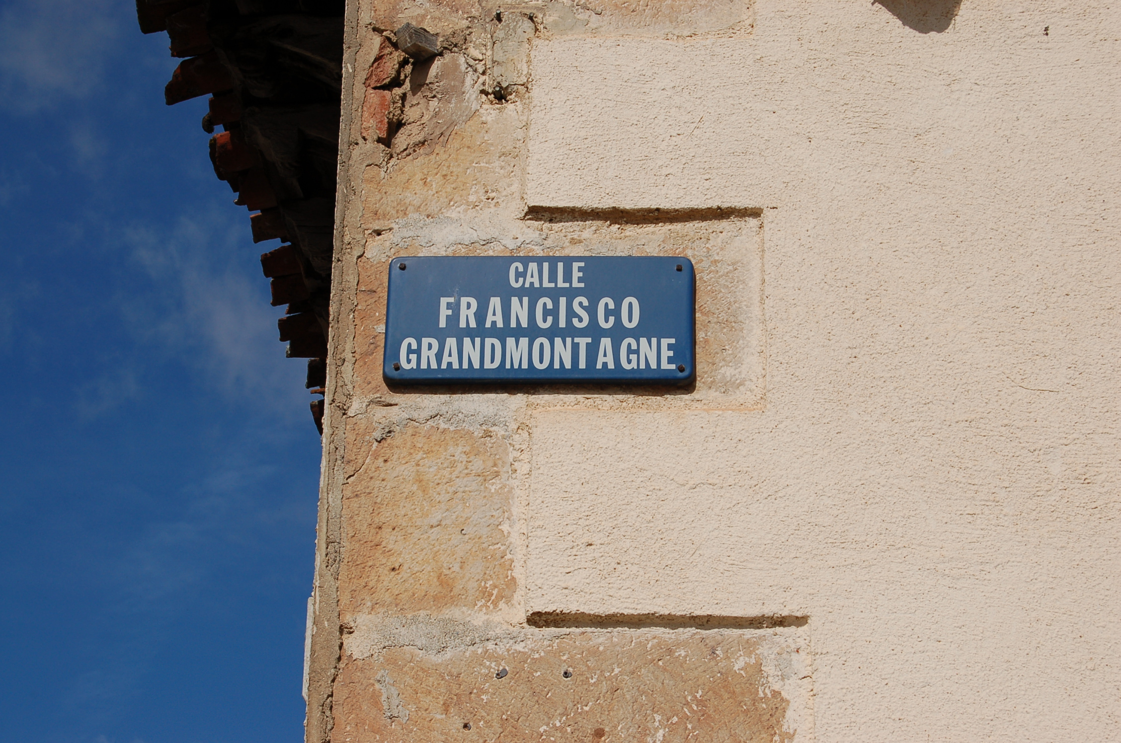 Placa de la calle de Francisco Grandmontagne en Barbadillo de Herreros